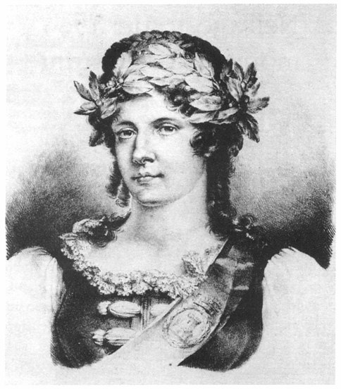 Ritratto di Maria Pellegrina Amoretti, prima donna laureata d'Italia (1777)